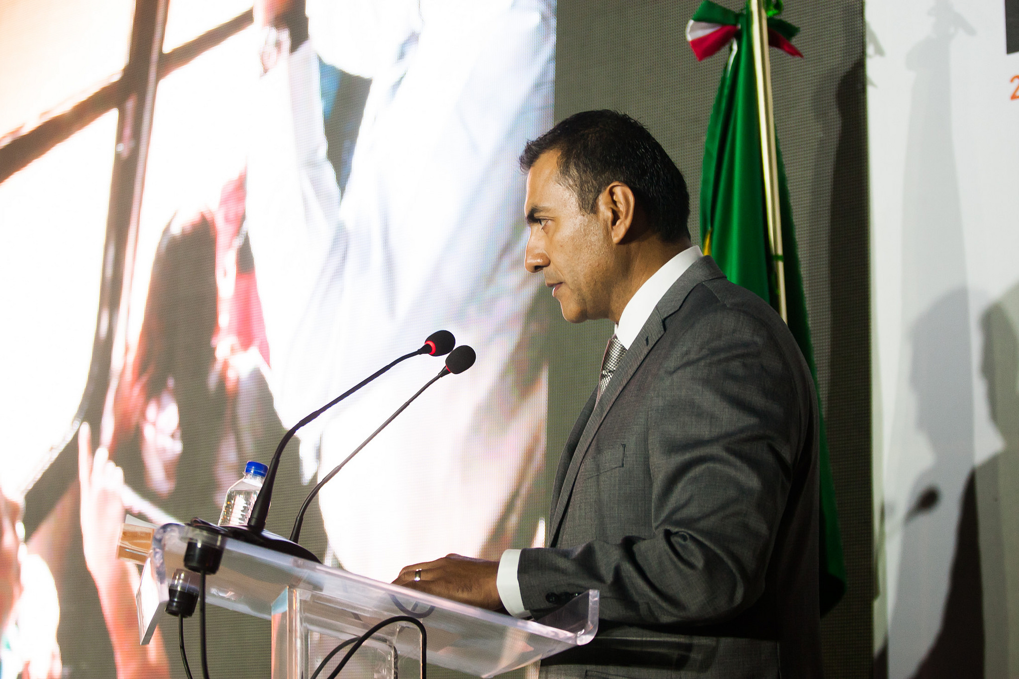 Diputado de la LX Legislatura en el Congreso de Jalisco